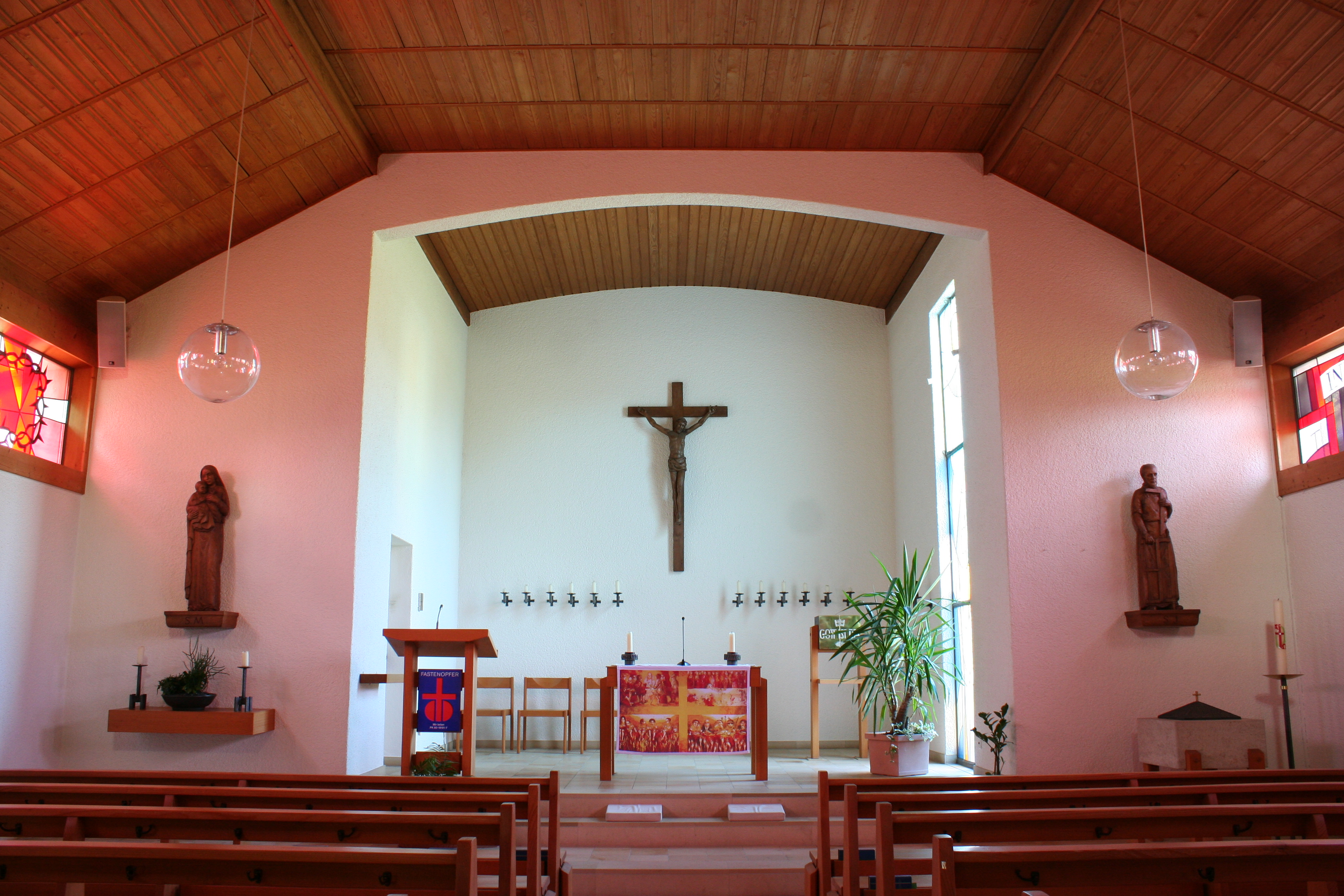 Römisch-katholische Kirche St. Josef Rickenbach-Sulz